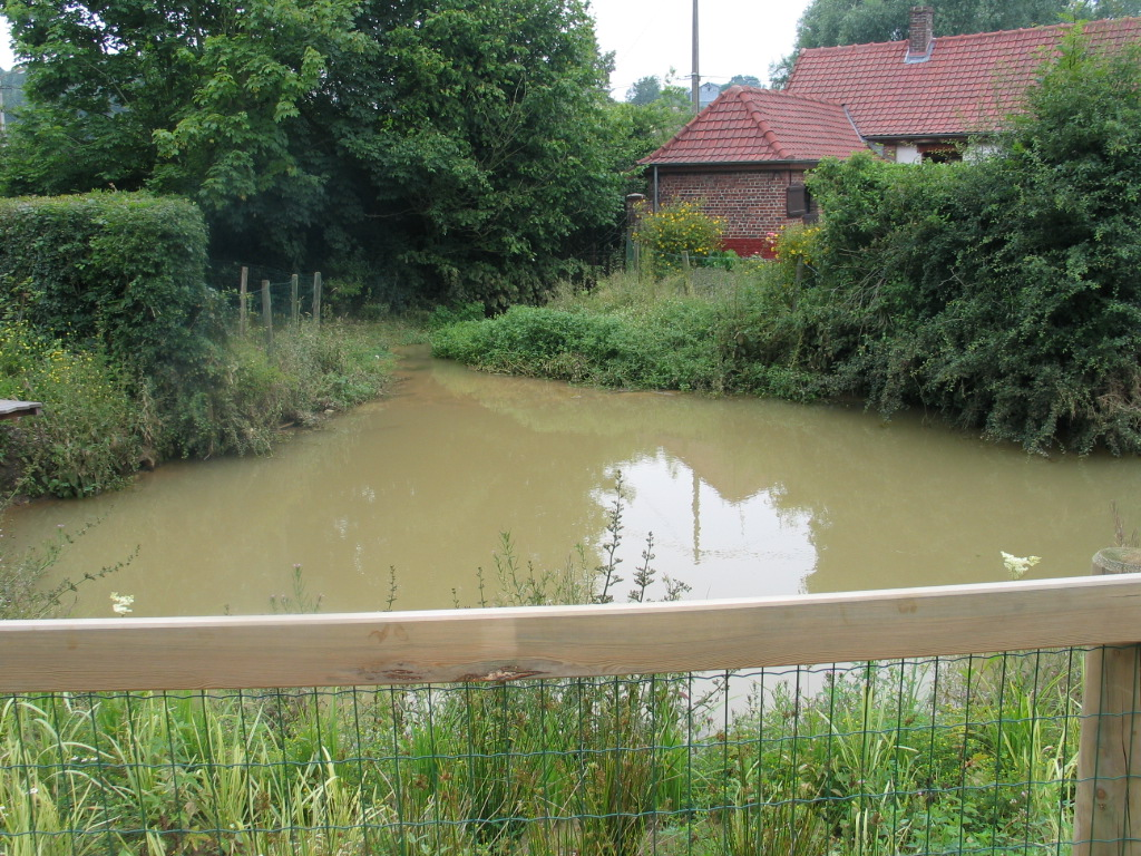 La source de la Lys à Lisbourg - Pas-de-Calais (F).